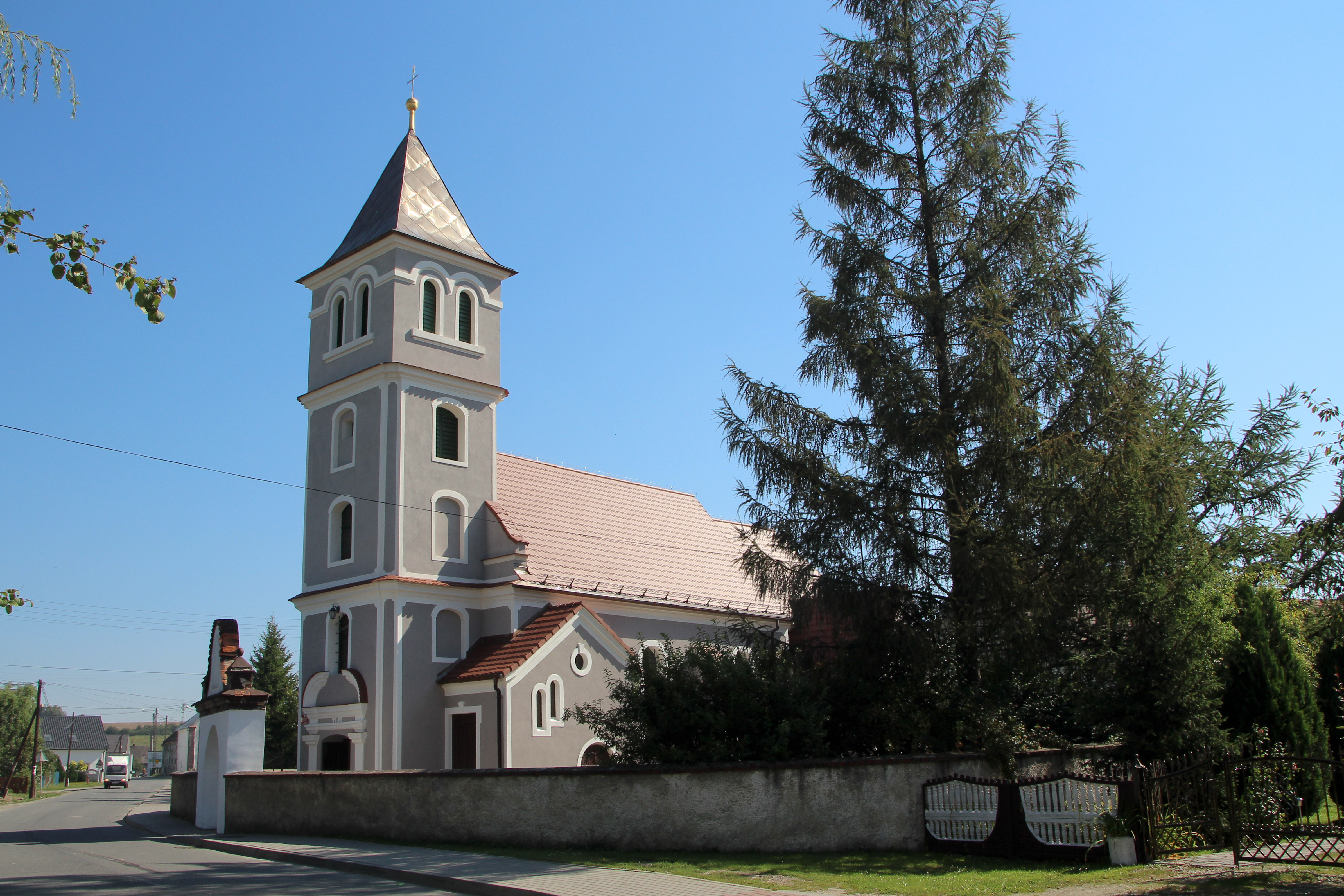 Przełęk – rzymskokatolicki kościół filialny p.w. św. Mikołaja, pocz. XVII, 1780, XIX